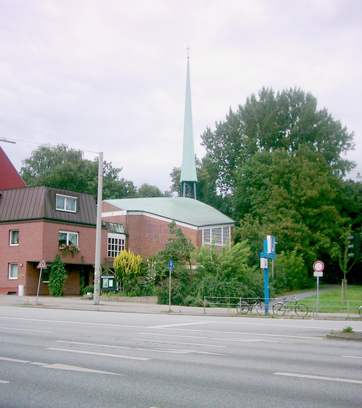 Die Dreieinigkeitsgemeinde/Kirche zur Heiligen Dreieinigkeit der Selbständigen Evangelisch-Lutherischen Kirche (SELK) in Hamburg-Hamm, Burgstraße.